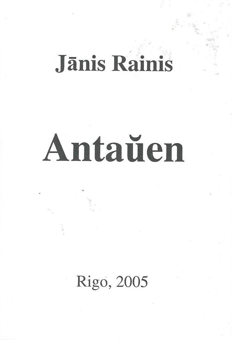 librokovrilo de libro "Antauen", 2005